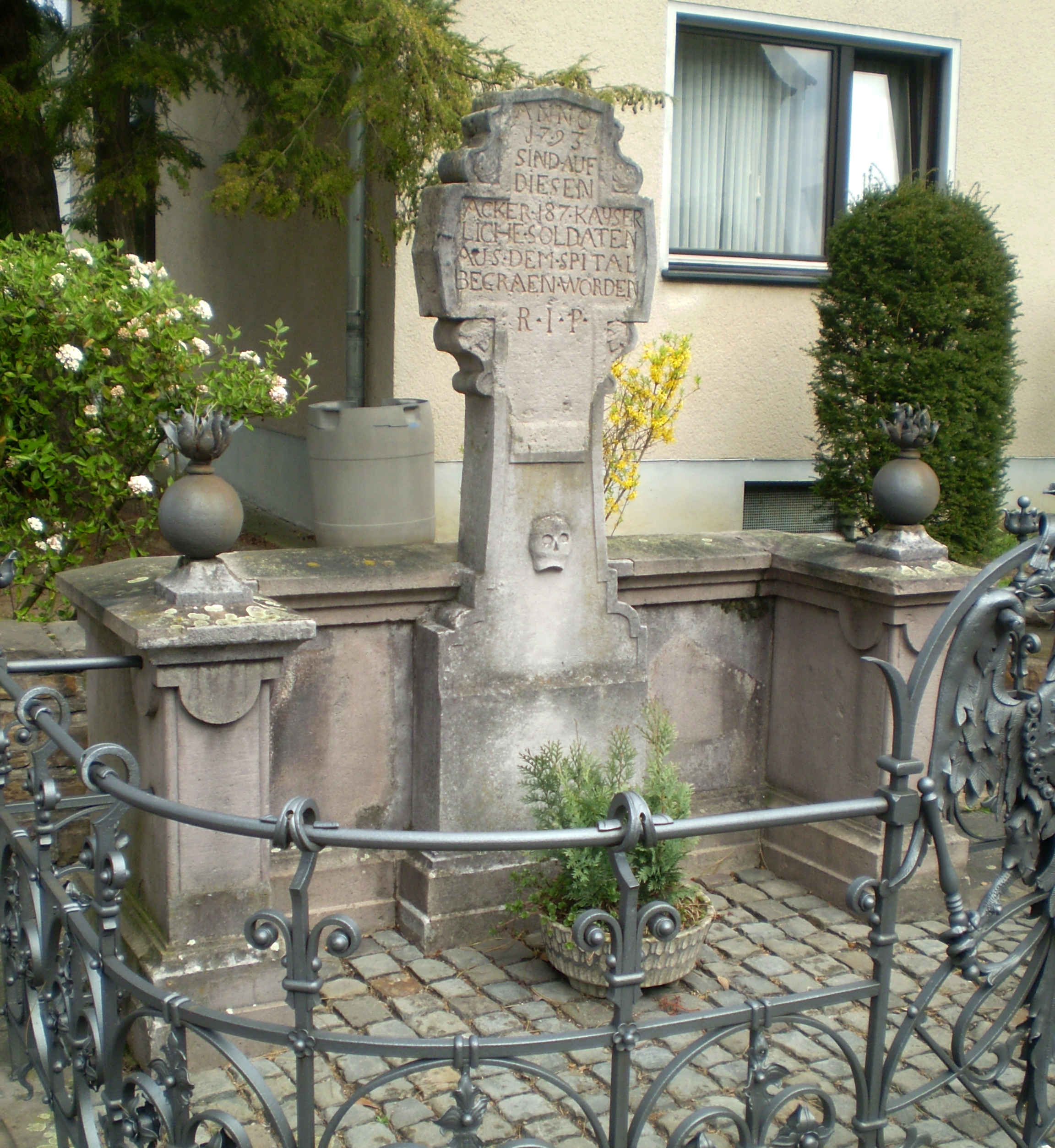 Grabkreuz Österreicher Kreuz, Ecke Am Wolfshof/Am Schönblick, Bad Honnef